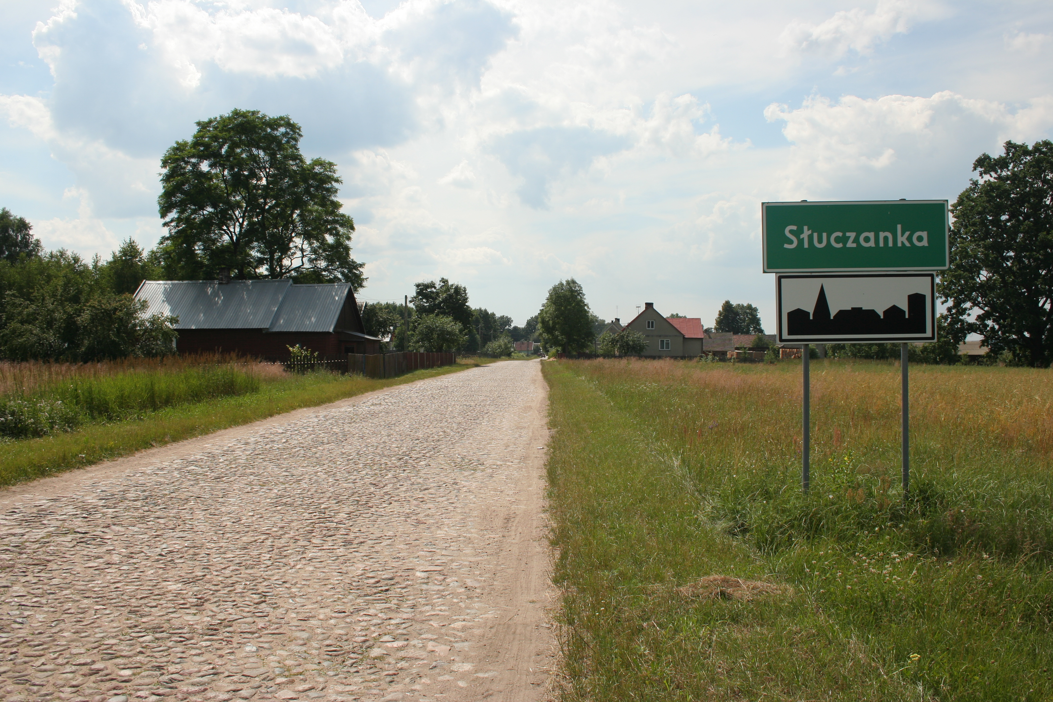 Droga wjazdowa do Słuczanki.